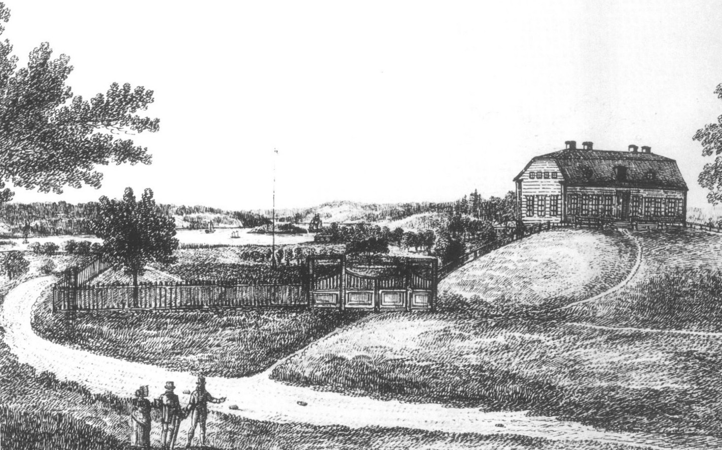 Breviks herrgård som den avbildats på en tuschteckning av A. F. Cederholm år 1816.